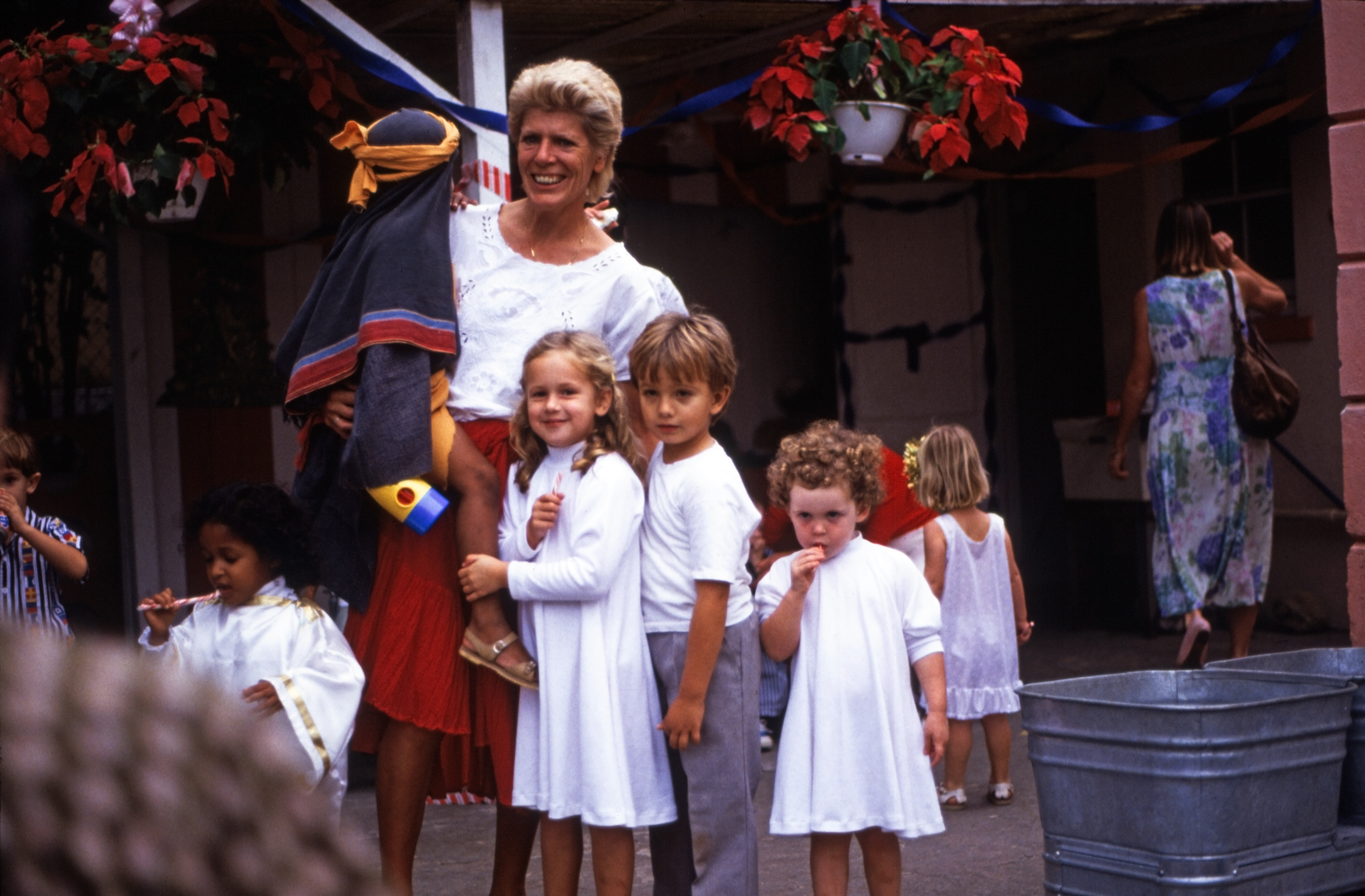 Weihnachtsfest in der Creative Learning Preschool in Nassau , New Providence (Bahamas) .